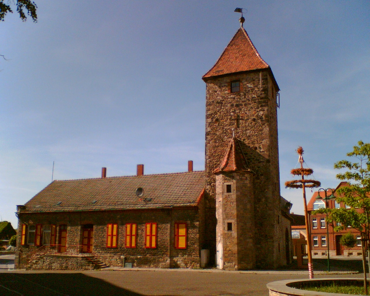 Turm mit Zeltdach, auf der Westseite niedrigeres polygonales Treppentürmchen